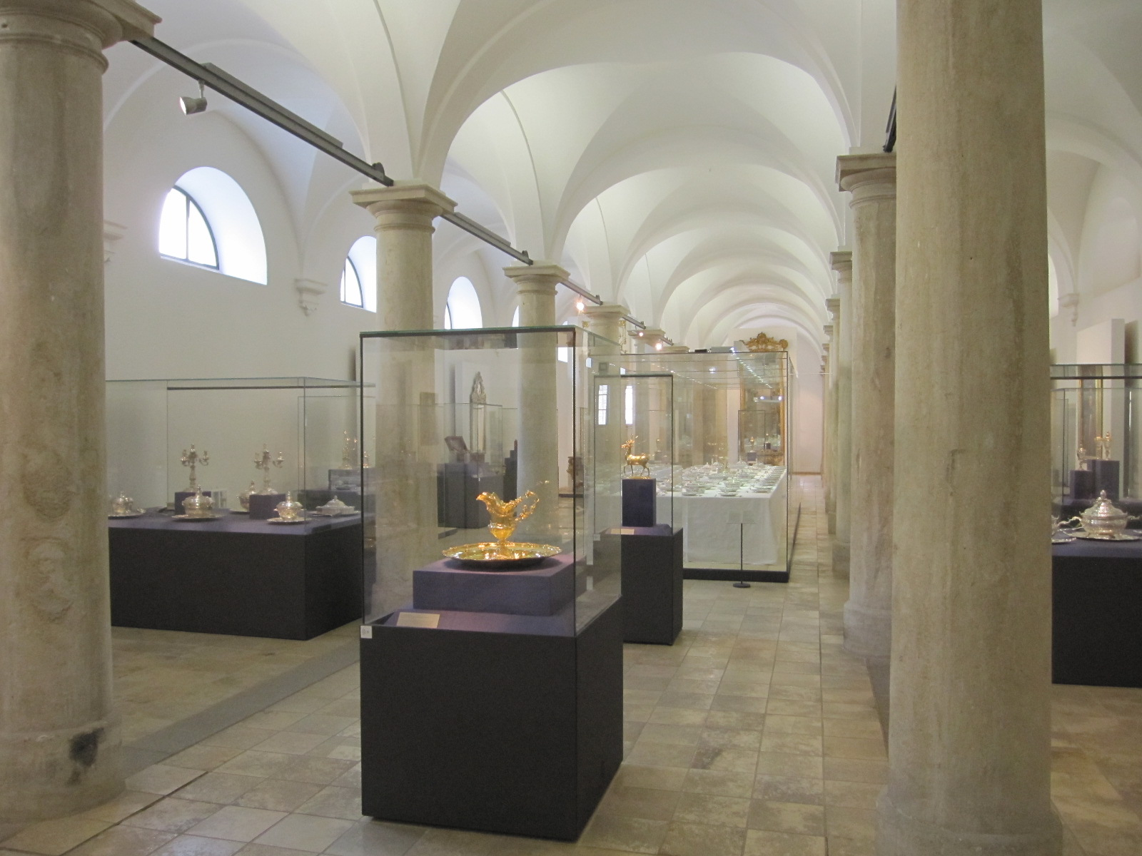 Fürstliche Schatzkammer Thurn und Taxis